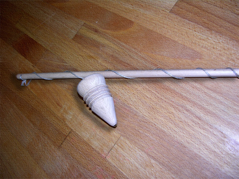 Peitschenkreisel